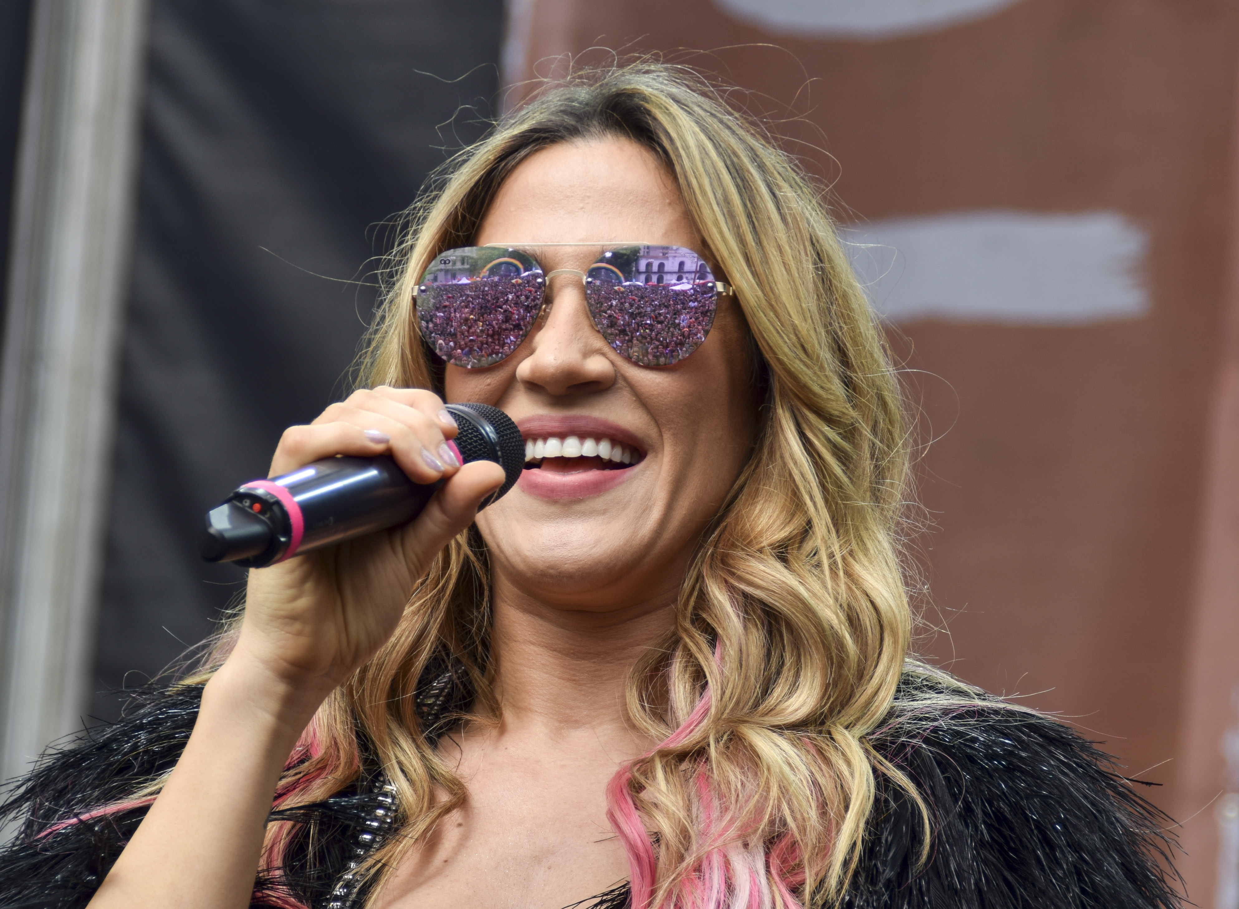 Buenos Aires, 17 de noviembre de 2018._Miles de personas celebran la 27° Marcha del orgullo LGBTIQ (Lesbianas, Gays, Bisexuales, Trans, Intersexuales y Queers) de Buenos Aires.El evento arrancó temprano el sábado con una feria en Plaza de Mayo, donde hubo shows de Mimi Maura y Jimena Barón, entre otros. Desde las 17, una caravana de carrozas marchó hasta la Plaza de los Dos Congresos. Fotos Kaloian/ Secretaría de Cultura de la Nación.